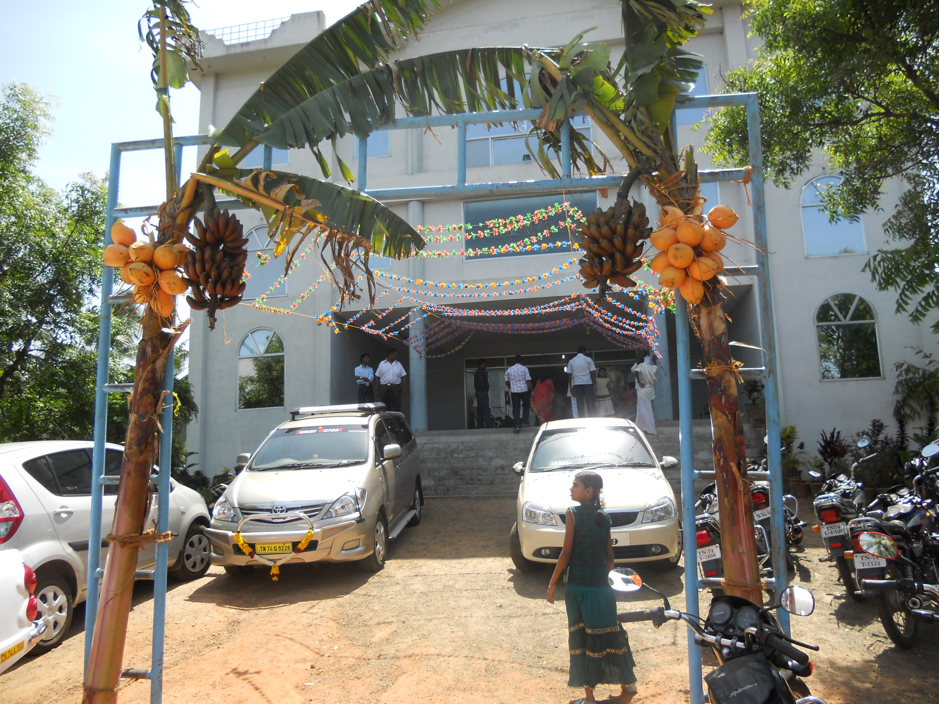 பந்தல் அமைத்தல்